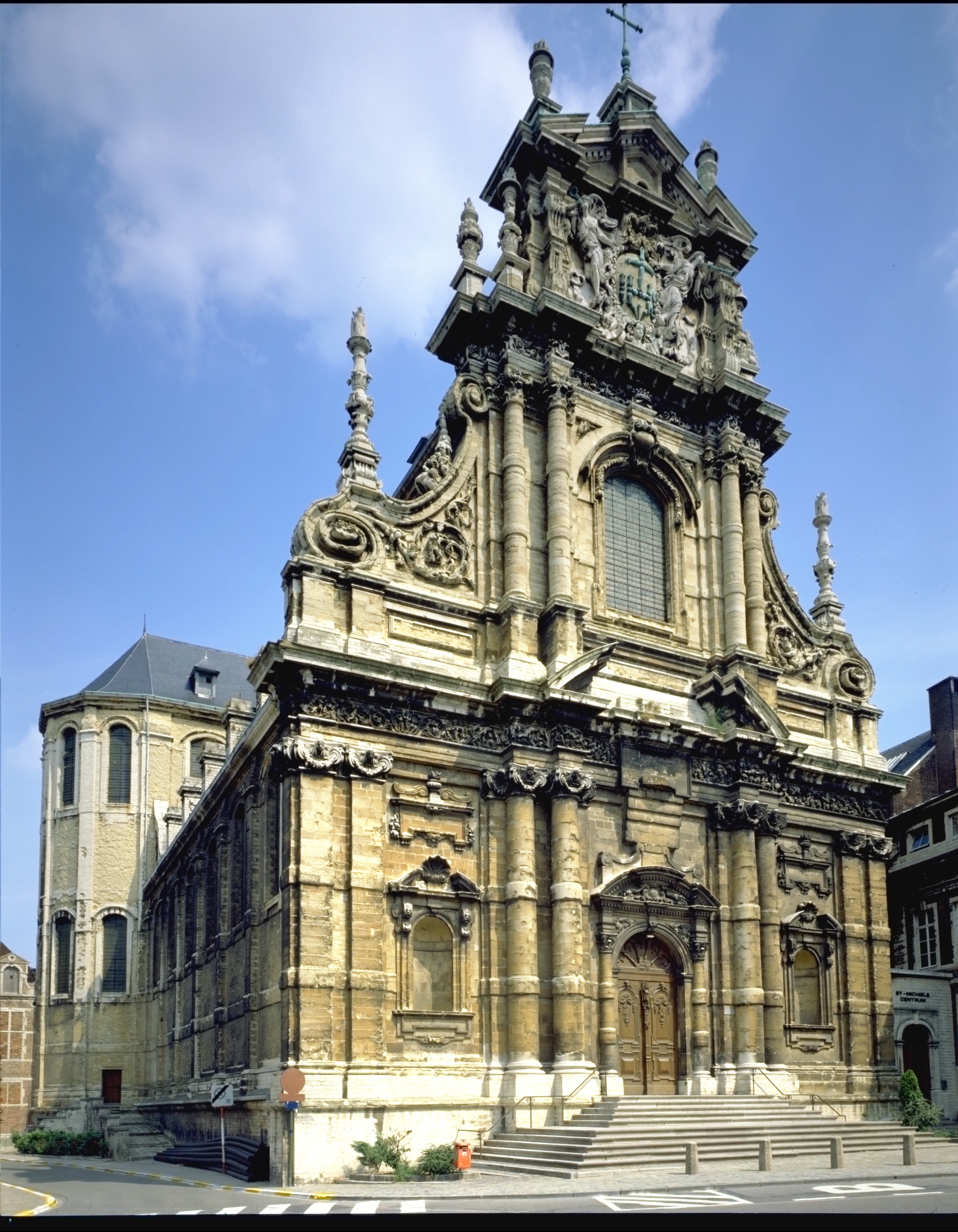 De St.Michielskerk